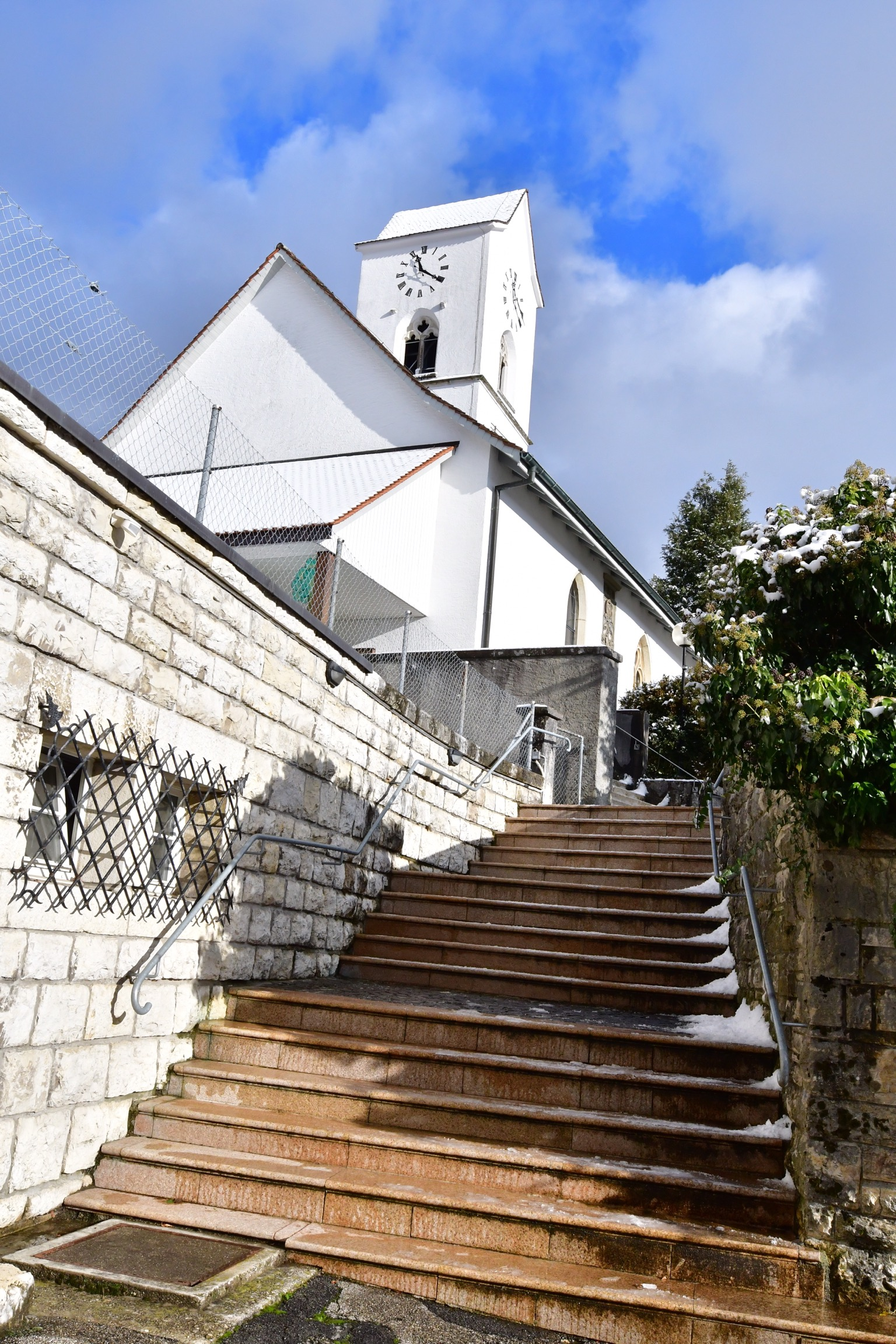 Treppenaufgang zur Kirche Lengnau BE